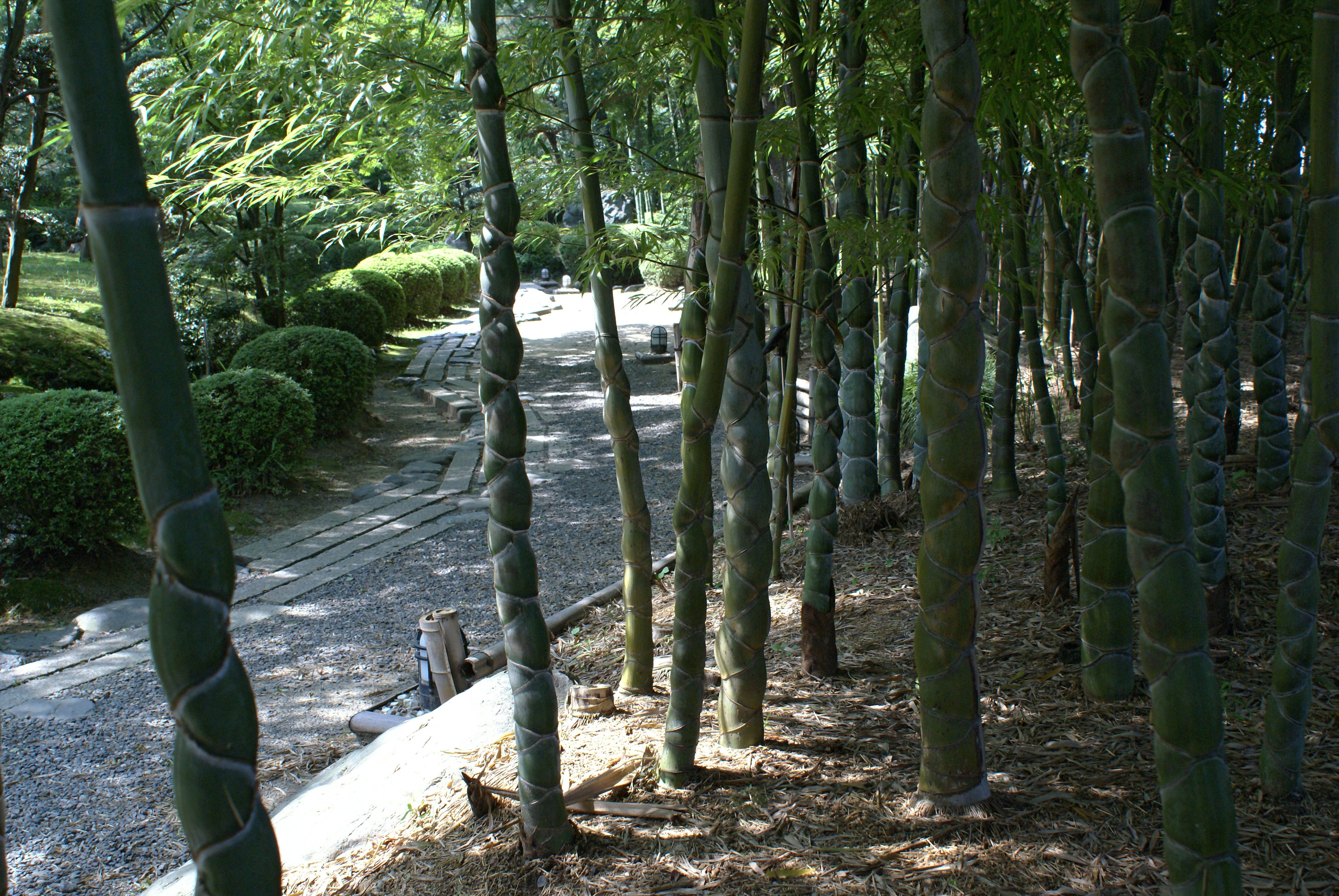 Shokado in Yawata, Kyoto, Japan